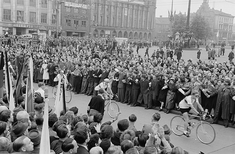 Original image description from the Deutsche FotothekRadrennfahrer, u.a. Gustav Adolf Schur (ganz rechts), beim Etappenstart auf dem Karl-Marx-Platz (heute: Augustusplatz)